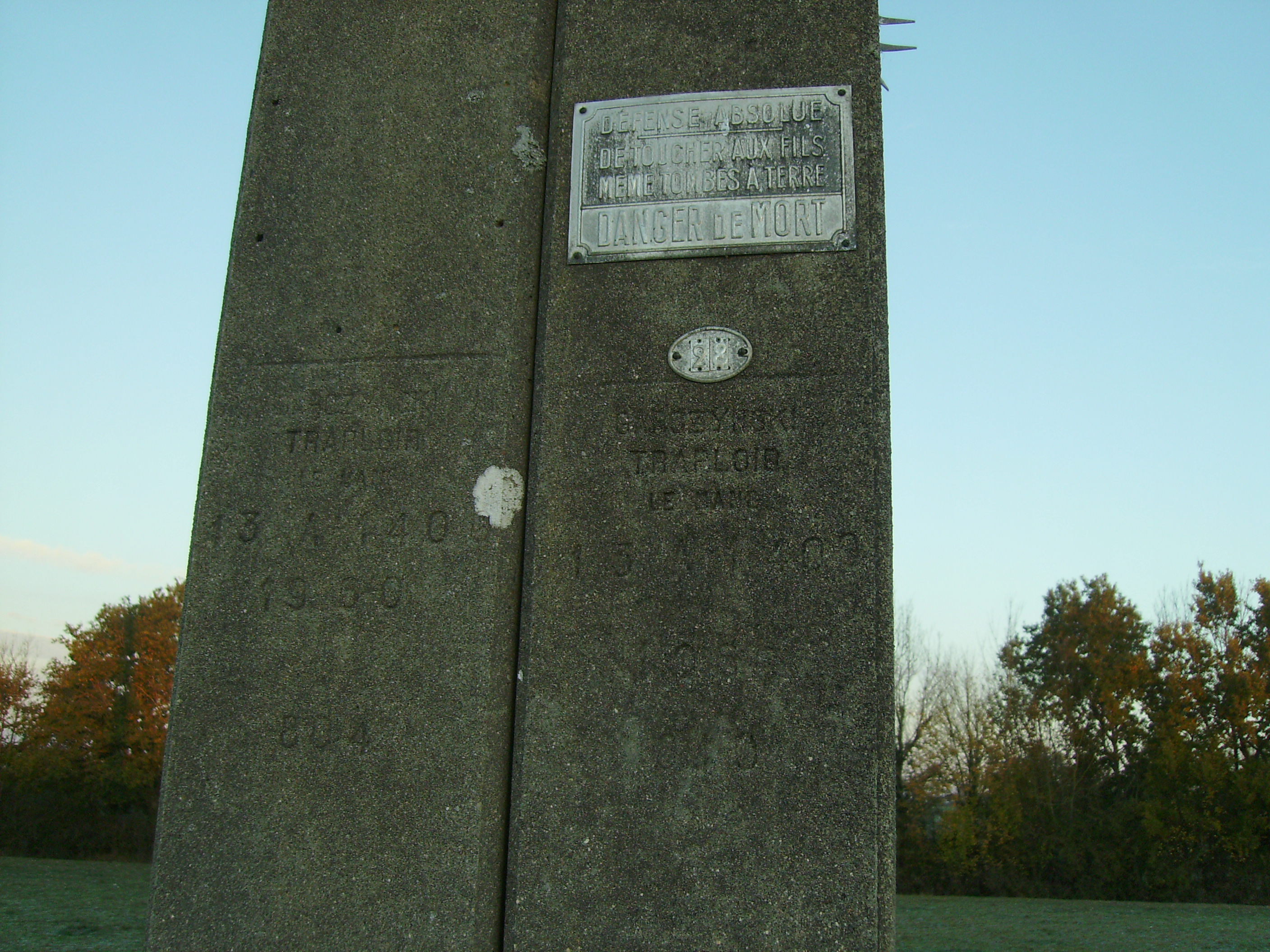 Photographie prise à la Meilleraie-Tillay, près des Carrières, montrant les inscriptions sur un support HTA, et comprenant signature, année fabrication et caractéristiques mécaniques.